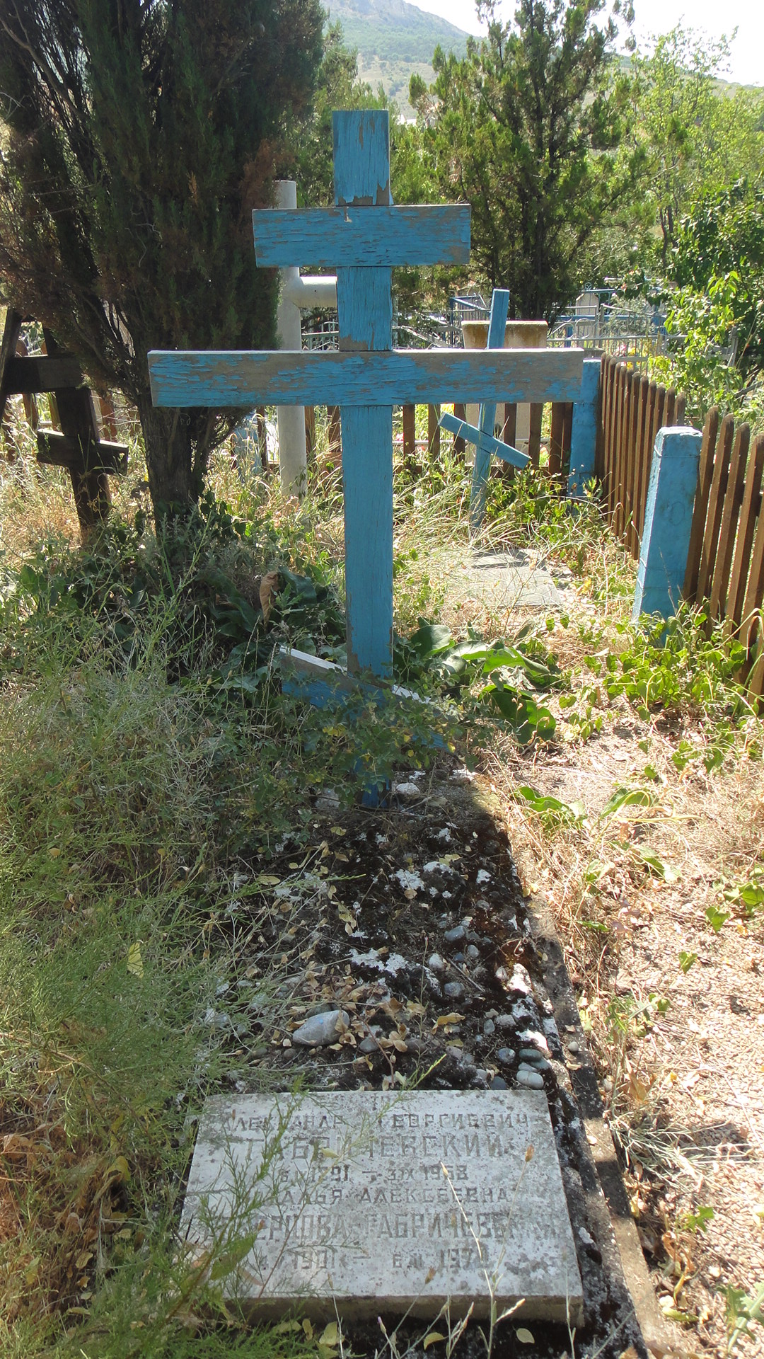 Коктебельское кладбище